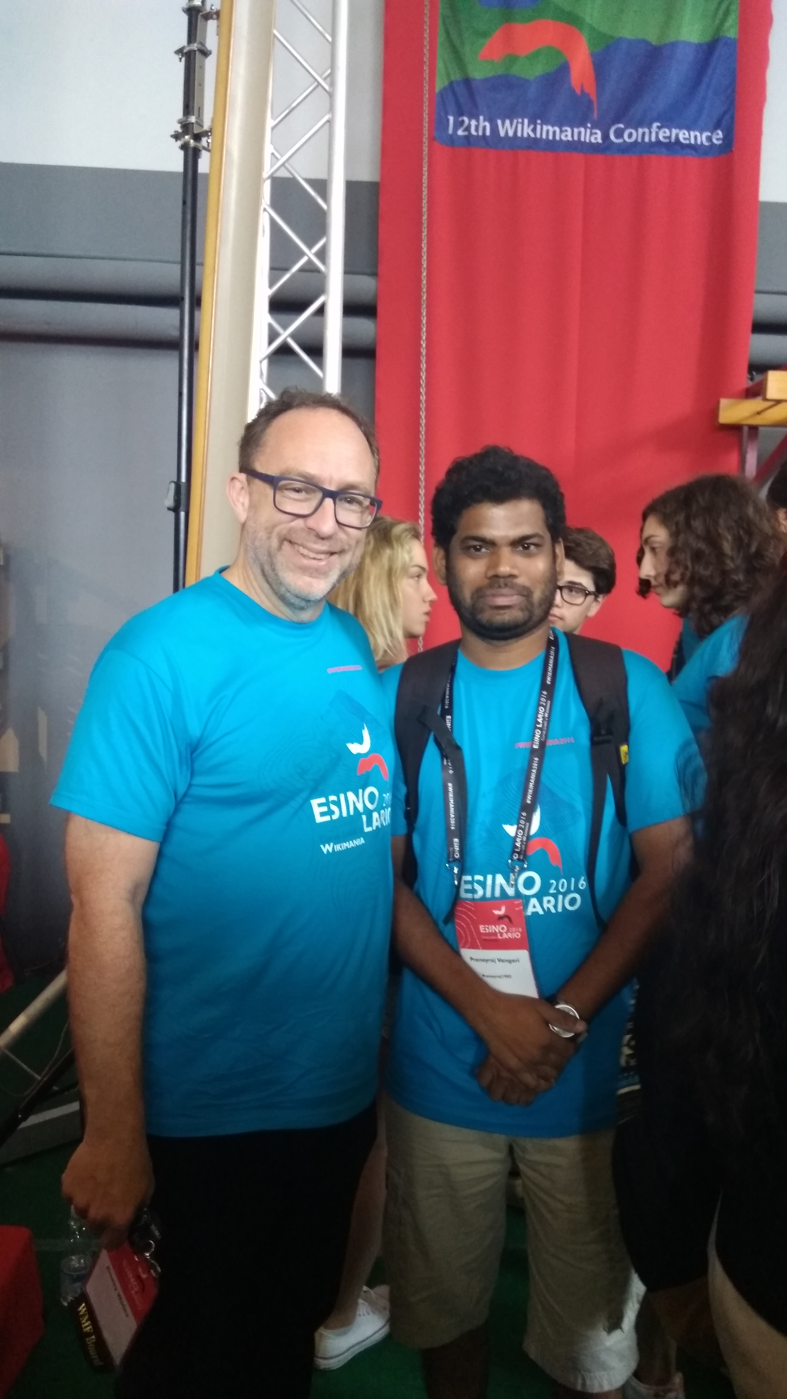 జిమ్మి వేల్స్ తో ప్రణయ్